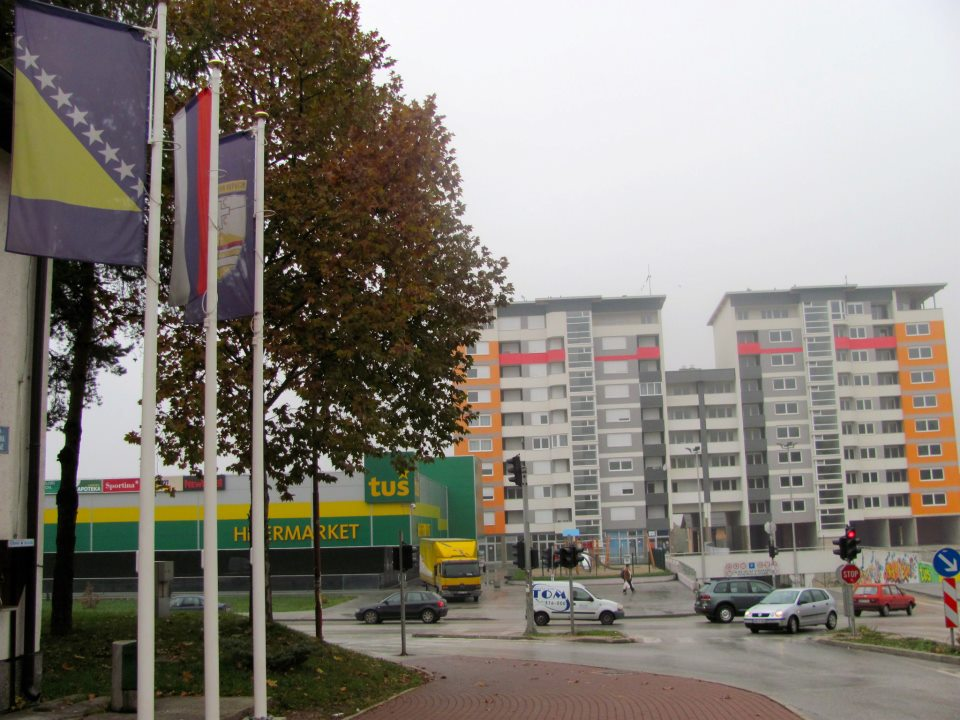 Kapija grada, I.N.S.